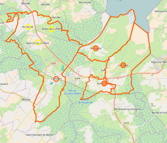 Carte de Carentan-les-Marais , commune nouvelle en janvier 2017